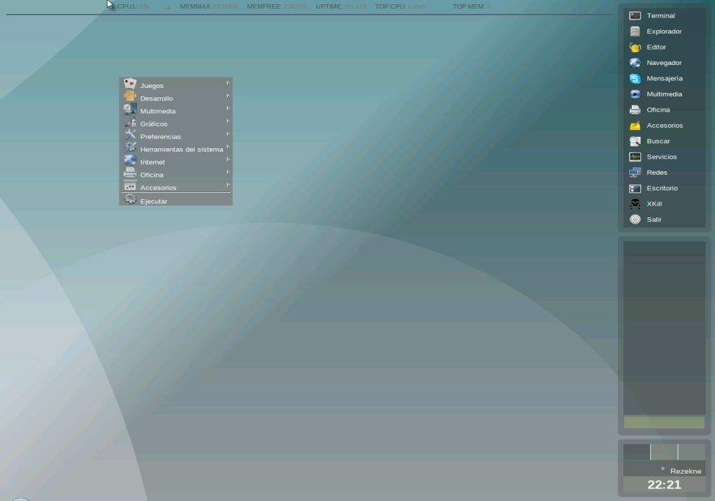 Captura de escritorio de Austrumi 2.4.0